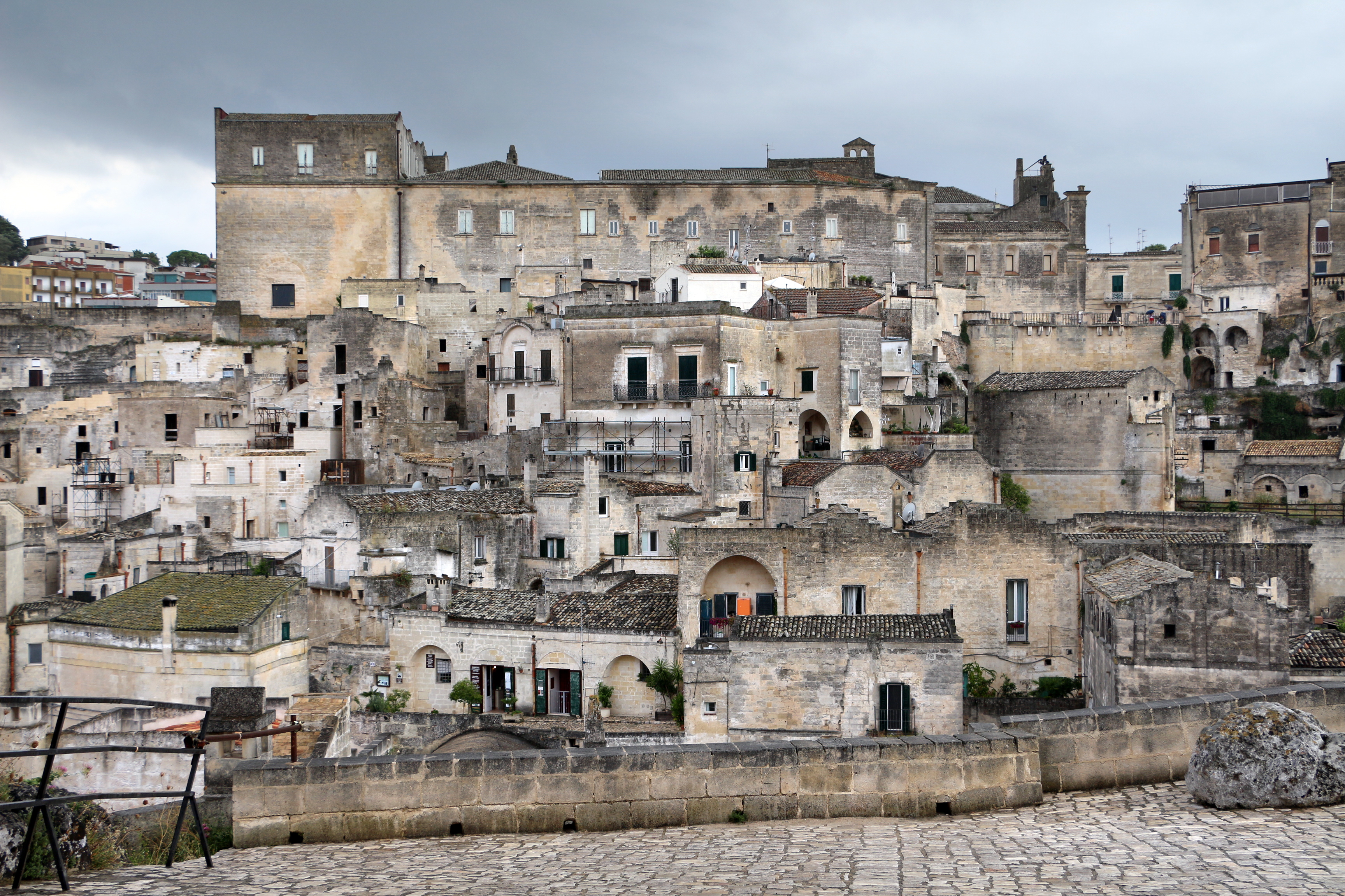 Palazzo Lanfranchi This is a photo of a monument which is part of cultural heritage of Italy.